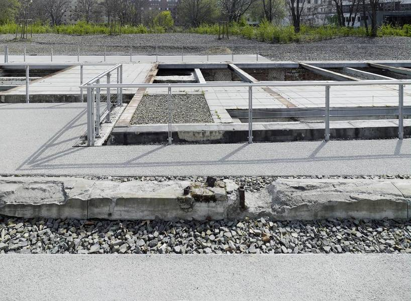 Geländerundgang der Topographie des Terrors